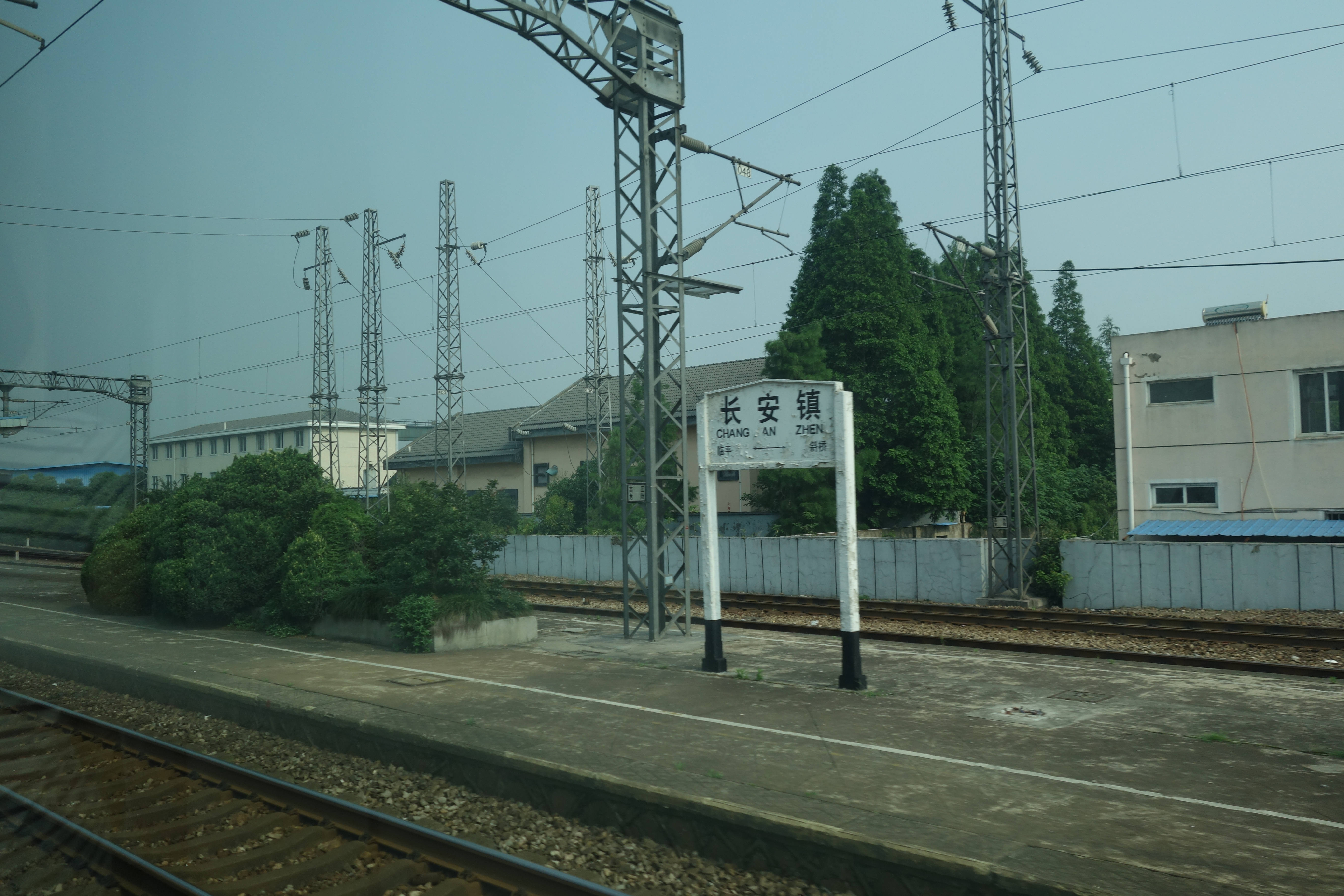 沪杭铁路长安镇站